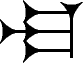 Cuneiform sign